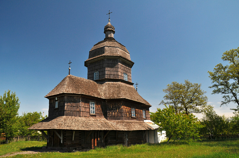 Троїцька церква в Драбівцях (1794 р.). Реставрована за проектом "Укрзахідпроектреставрація" наприкінці 20 ст. після чого набула рис західноукраїнського дерев'яного зодчества